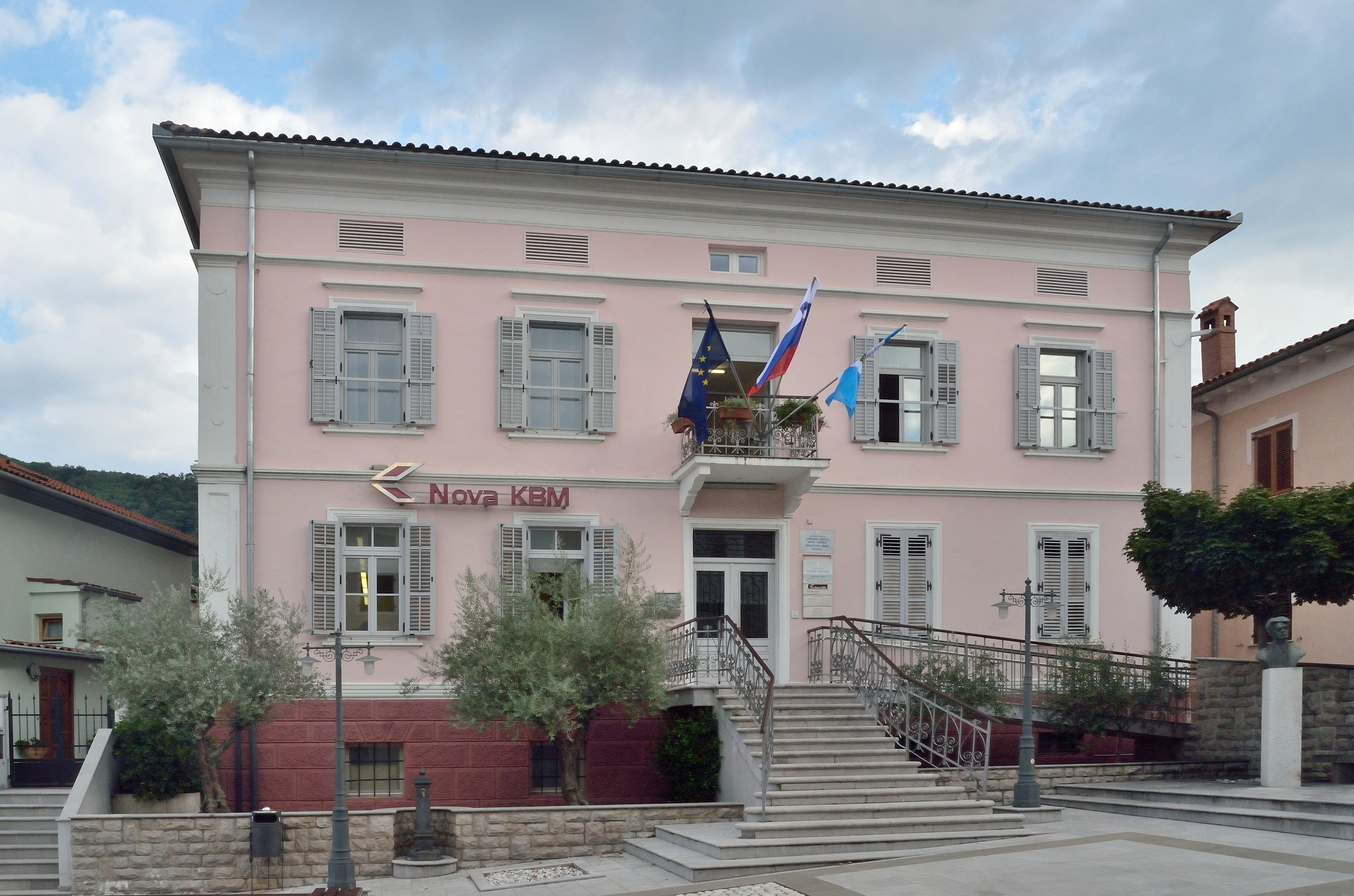 Kanal ob Soči Rathaus